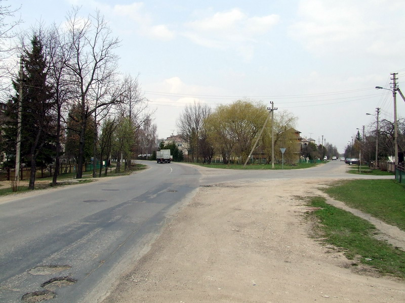 Rokų, Tamulšios ir N. Grigo gatvių sankirta Rokuose.